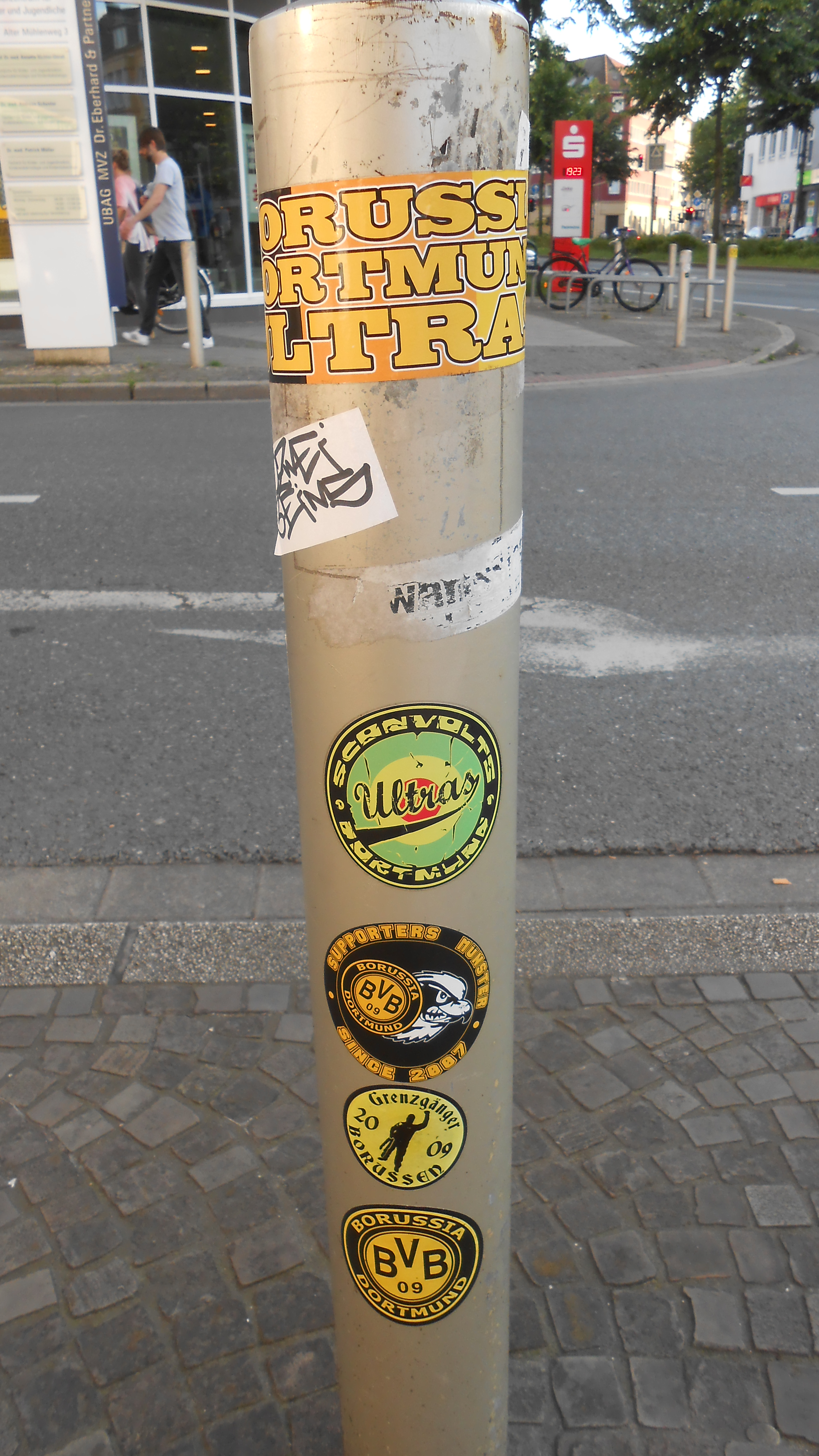 BVB-Aufkleber an einem Pfosten am Anfang des Alten Mühlenwegs / Ecke Hohe Straße.